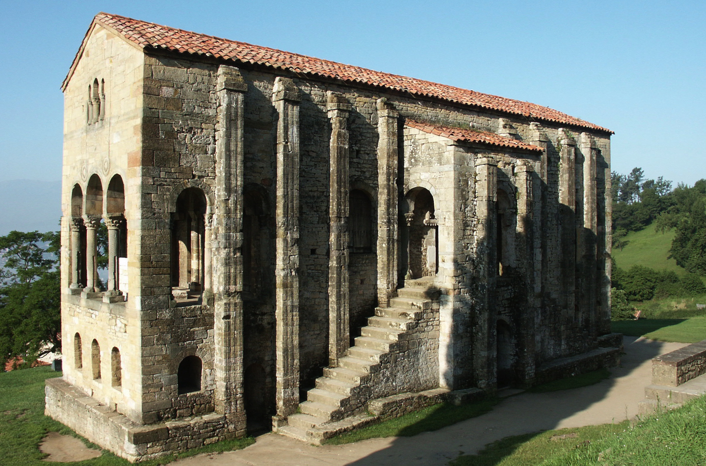 Nordfassade mit östlicher Loggia